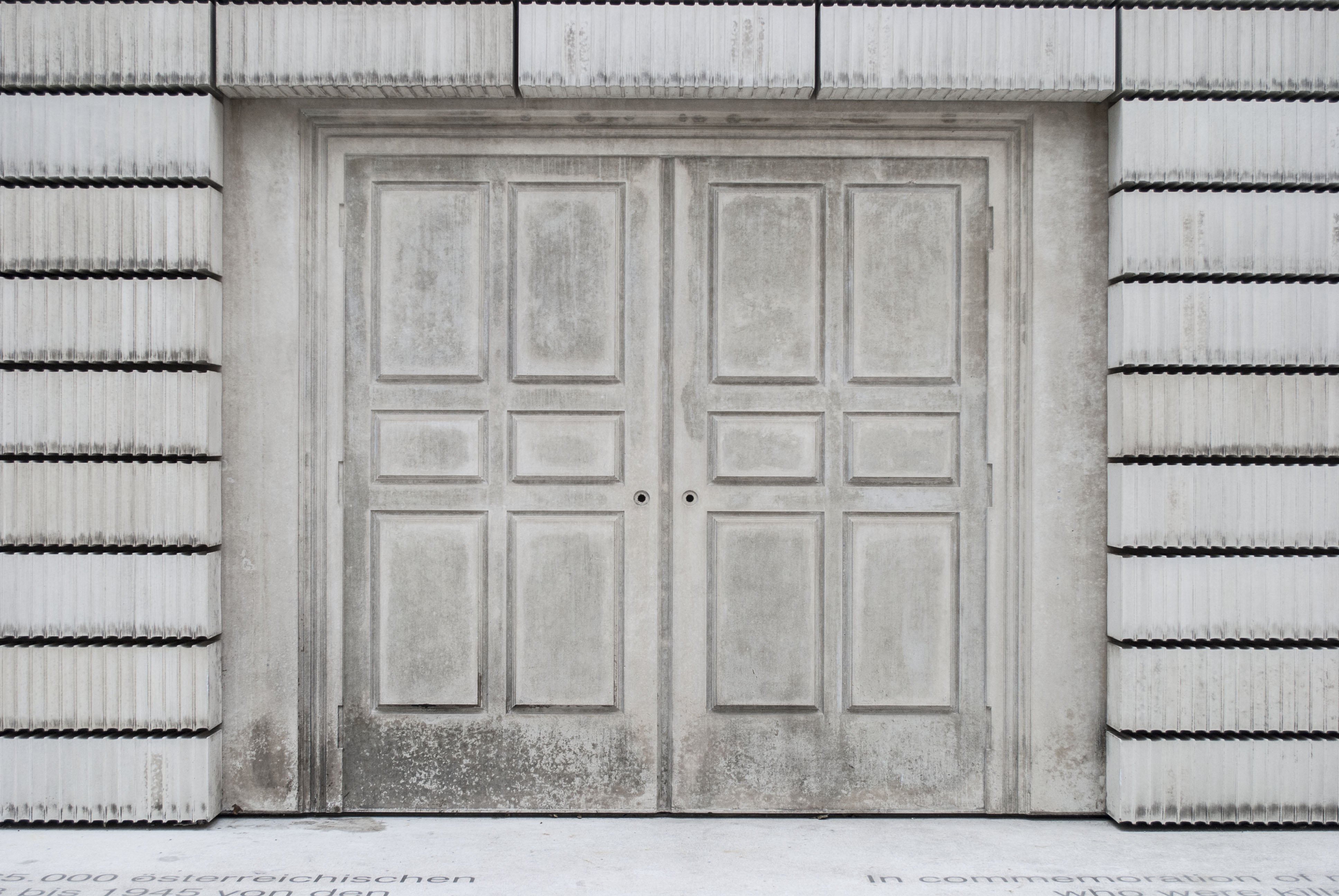 Holocaust-Mahnmal